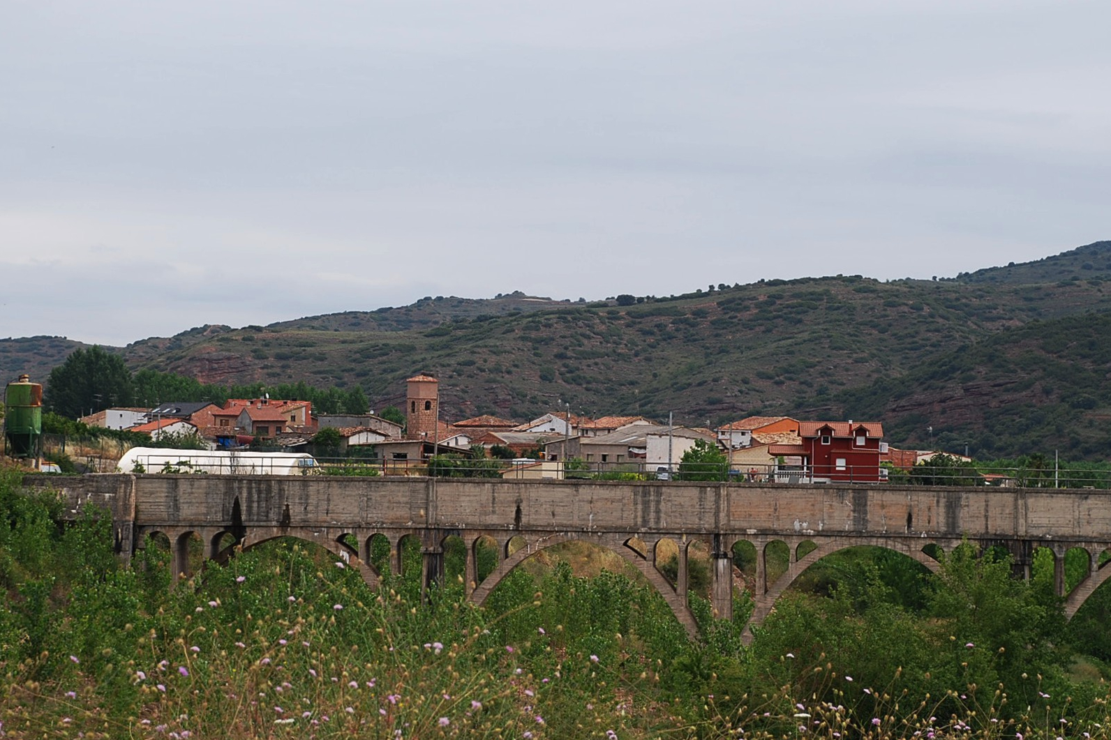 Vista de Bobadilla (La Rioja)